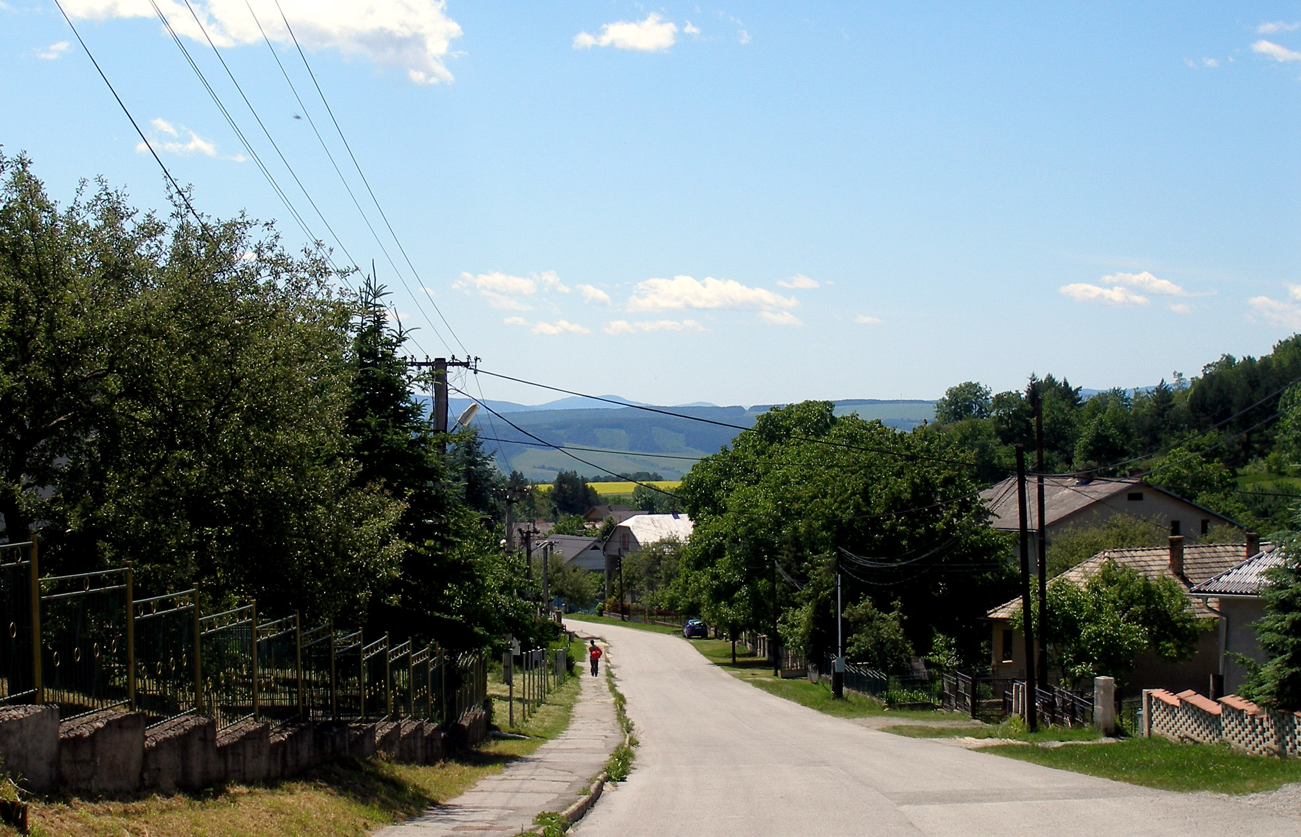 Obec Bodovce okres Sabinov